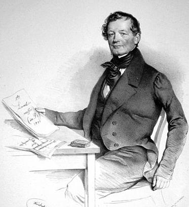 Anton Diabelli, Lithographie von Josef Kriehuber, 1841